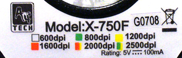 Stupně rozlišení laserové myši